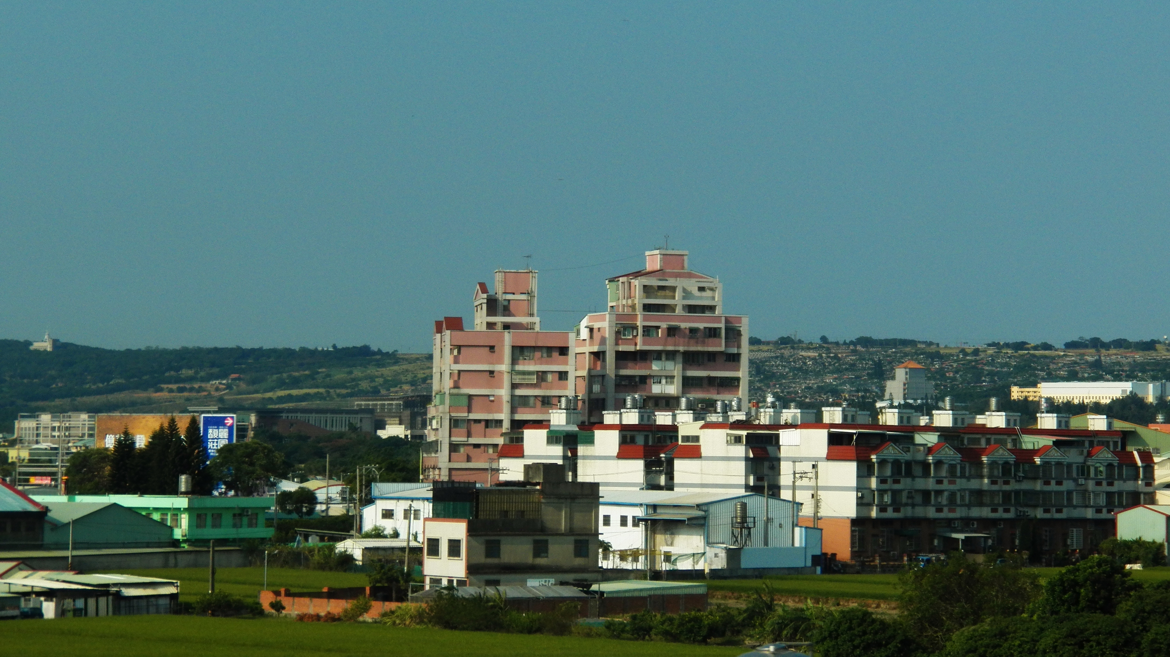 從台灣高鐵南下列車西望臺中市大雅區與遠方沙鹿區的丘陵。參加2012年陸軍成功嶺營區開放活動途中，練習高速攝影技巧的試拍照之一，由照片中房地產廣告配合Google Map確認所在位置。